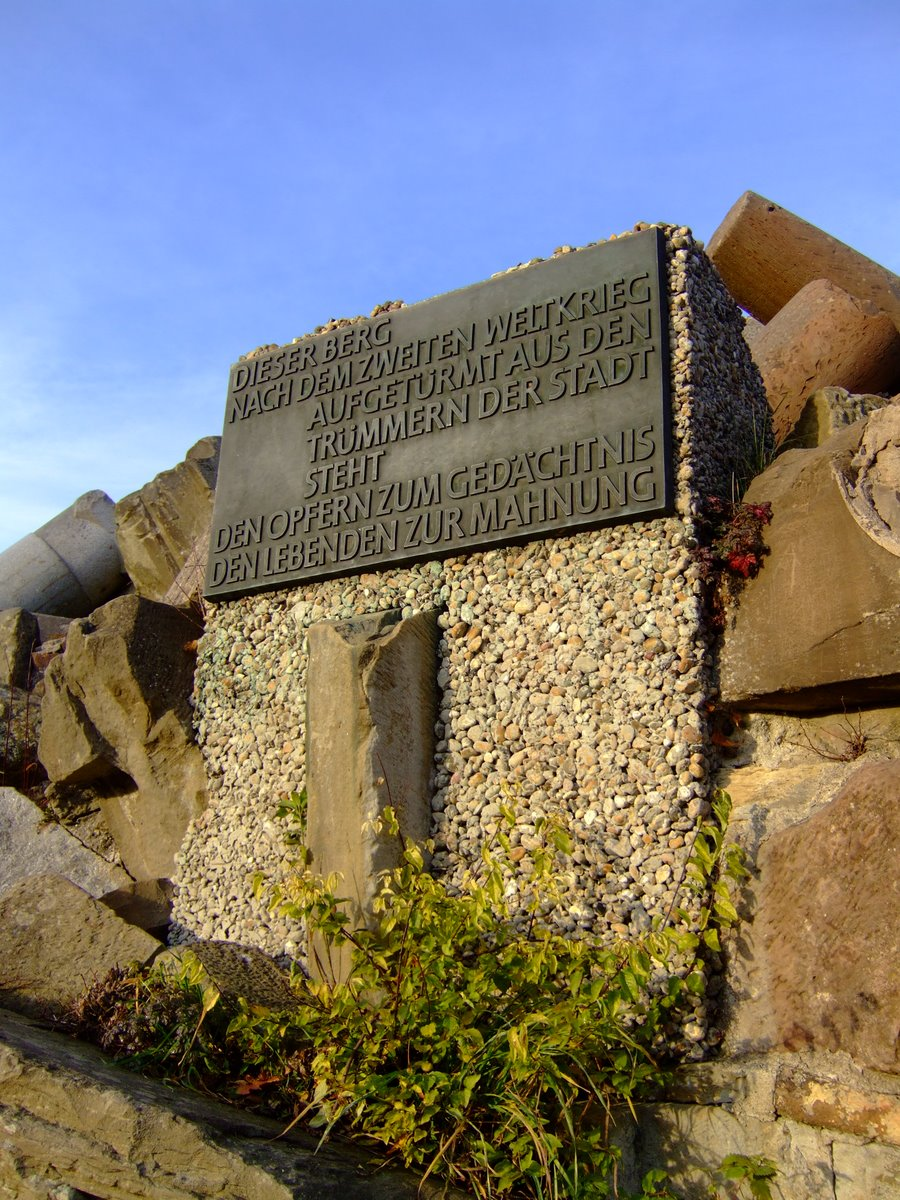 Das Lichtbild zeigt den Birkenkopf in Stuttgart-West. Aufgenommen durch Benutzer MBL am 17. Dezember 2006. Version 1 von 1.